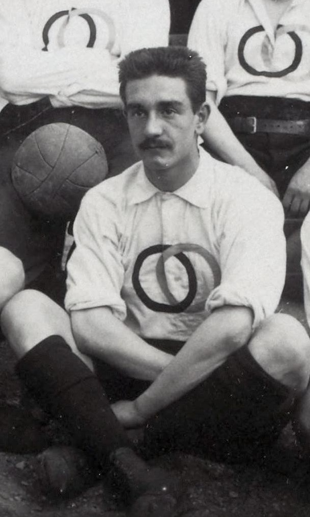 Georges Garnier en 1900 (Jeux Olympiques de Paris)